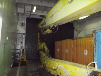 貨物船内部